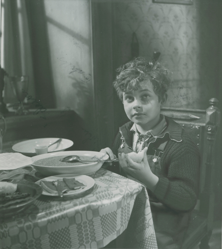 Tom Olsson, stillbildsfoto från filmen Göranssons pojke.